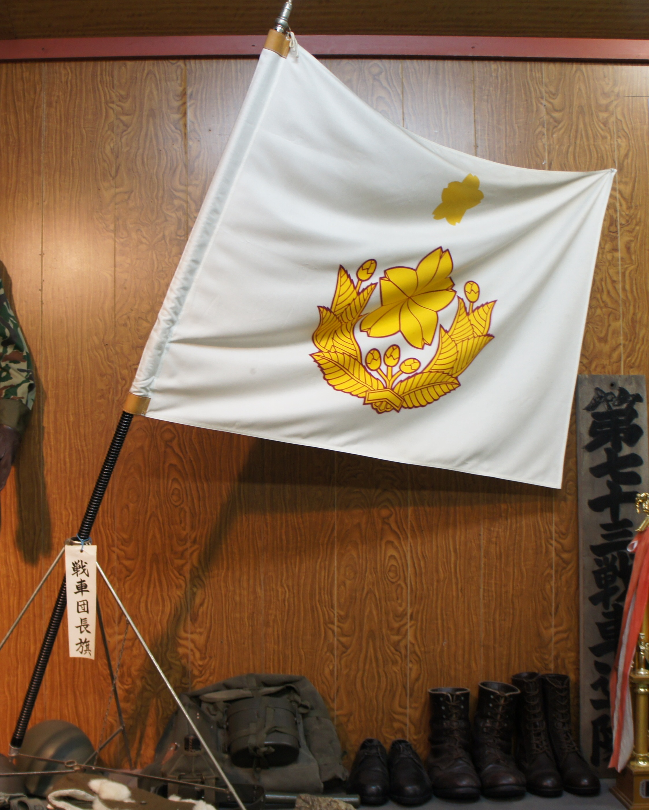 廃止になった第1戦車団長旗です。